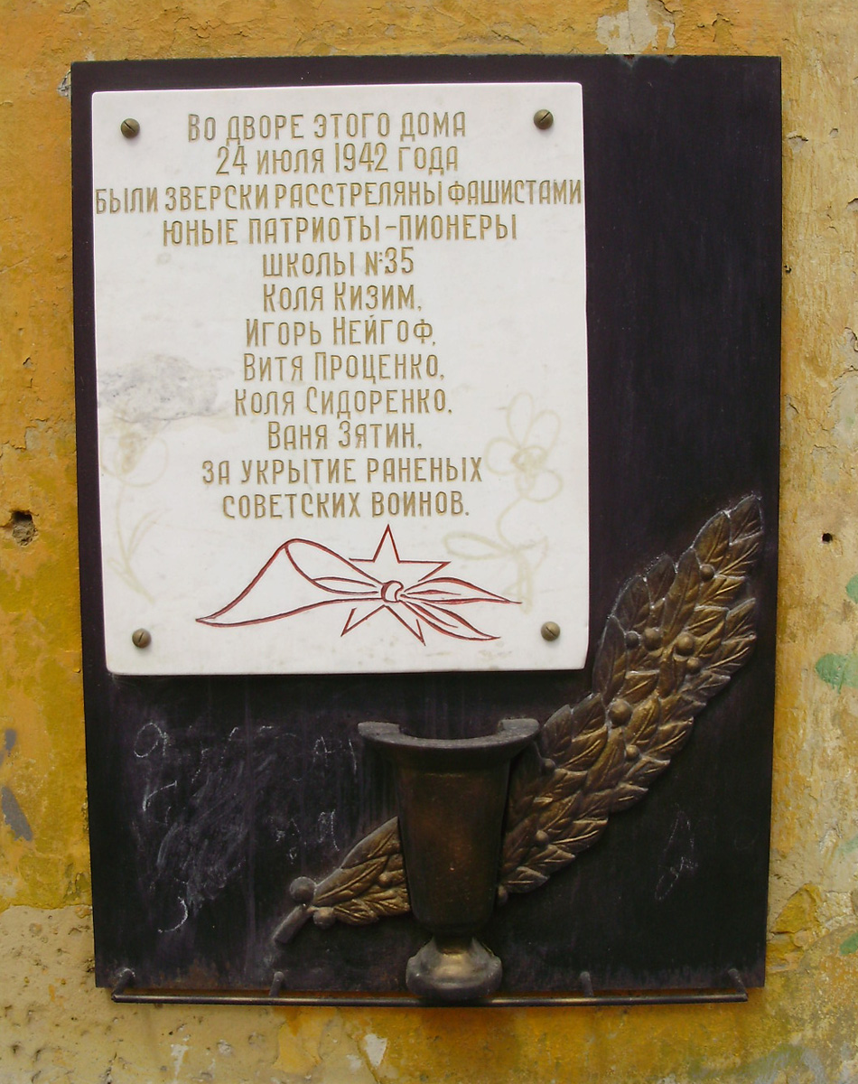 Ростов-на-Дону, составная памятная доска пионерам-патриотам ВОВ, ул. Ульяновская 27 (металл+камень).